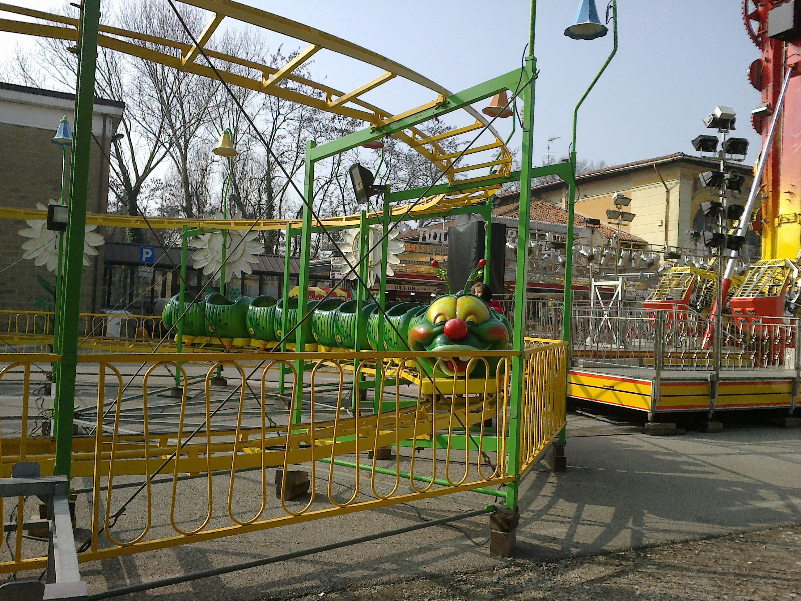 Brucomela alla Fiera di Sant'Anselmo di Mantova il 3 marzo 2012.